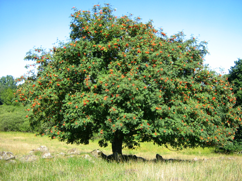 Solitäre fruchtende Eberesche (Sorbus aucuparia) am Rand eines Os´s bei Gatschow, Gmde. Beggerow, Landkreis Demmin, Vorpommern.)